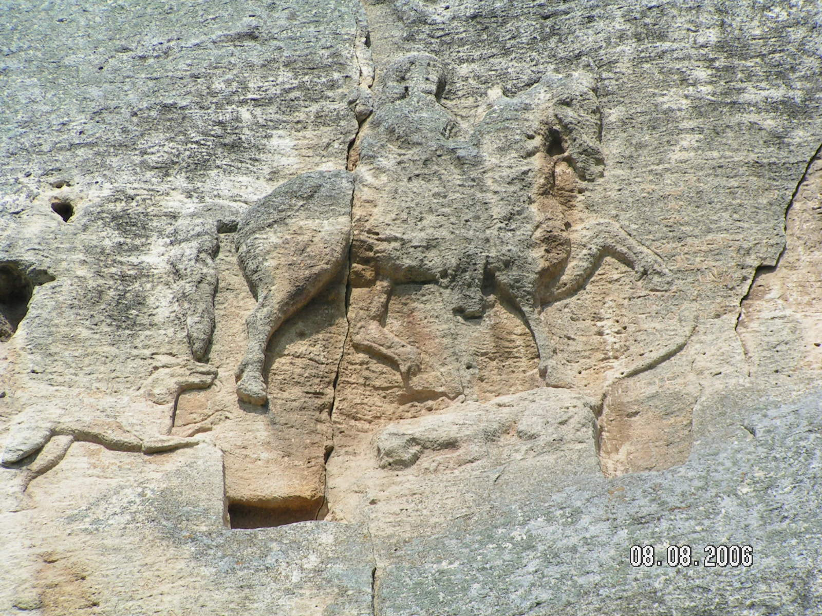 PŁASKORZEŹBA PRZEDSTAWIAJĄCA JEŹDZCA Z MADARY, 2006